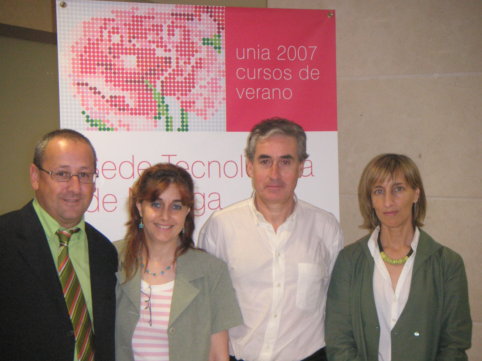 De izquierda a derecha, Fernando Palencia, Pilar Sepúlveda, Ramón Jauregui y Llanos Mora, en los Cursos de Verano 2007 de la Universidad Internacional de Andalucía.